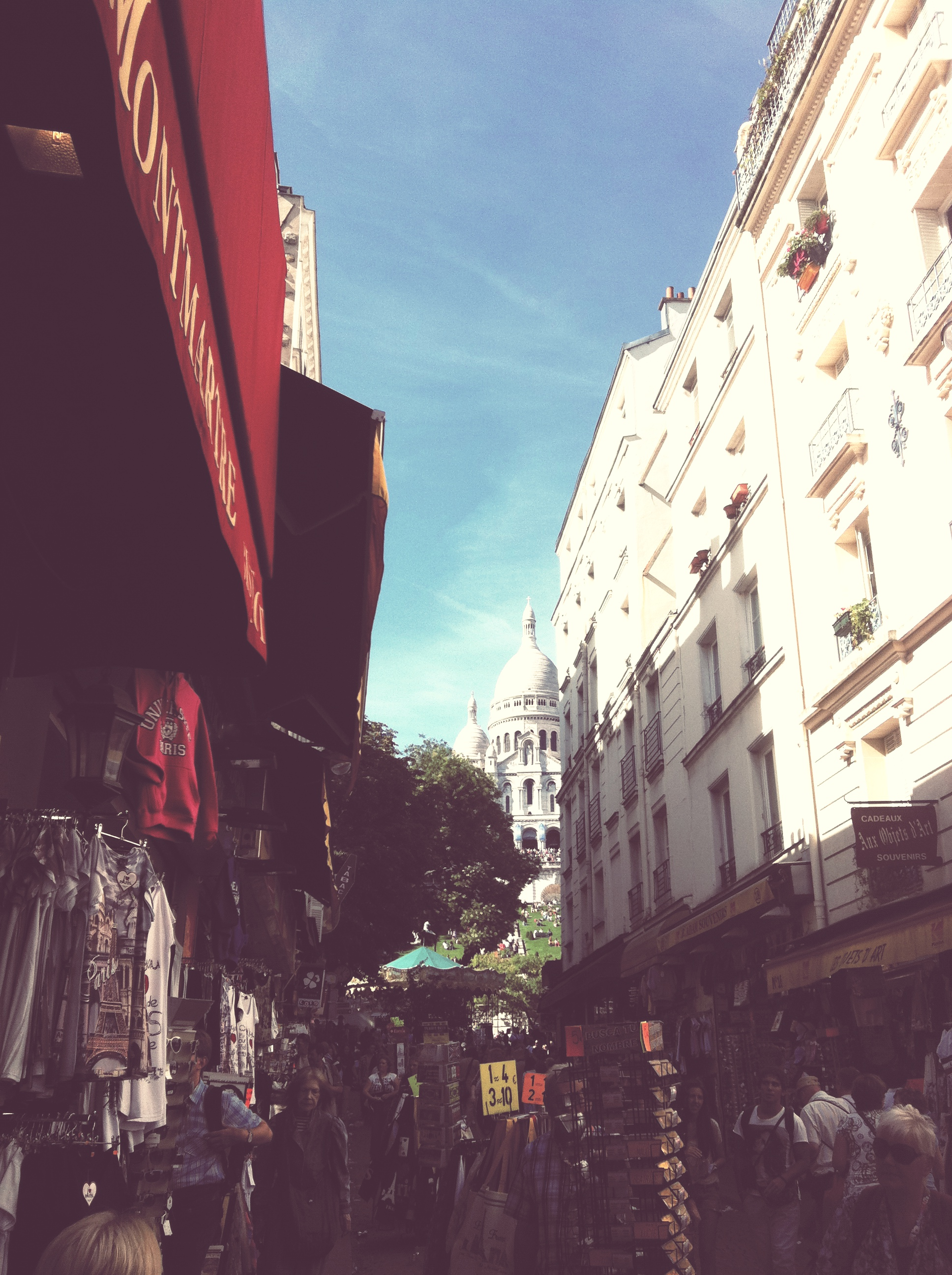 Le quartier de montmartre et ses nombreuses boutiques de souvenirs.